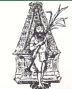 Saints of India, taught the Tamils to find God within their-self, not in temples, through his lyric poems in Tamil. The image was was first published in 2007 in a book called “theiva Alai” - author Sengai Podhuvan (same as the uploader). This image has been scanned from the book by the uploader